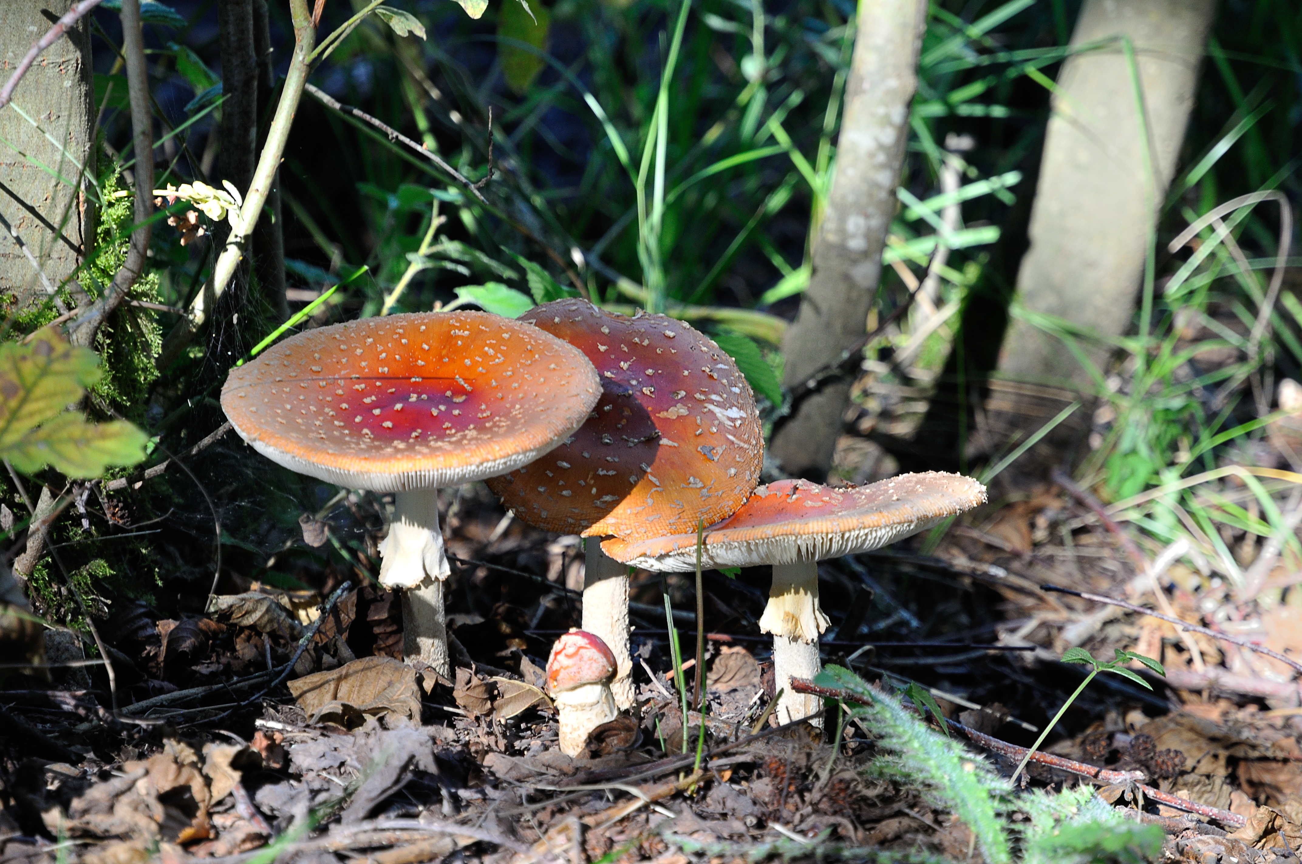 Habitants des bois, les champignons demandent une connaissance approfondie sur leur nature : comestible ou pas !